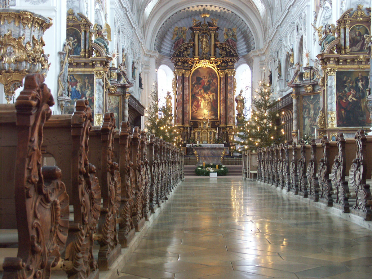 St. John the Baptist (Welfen Münster), Steingaden, Germany